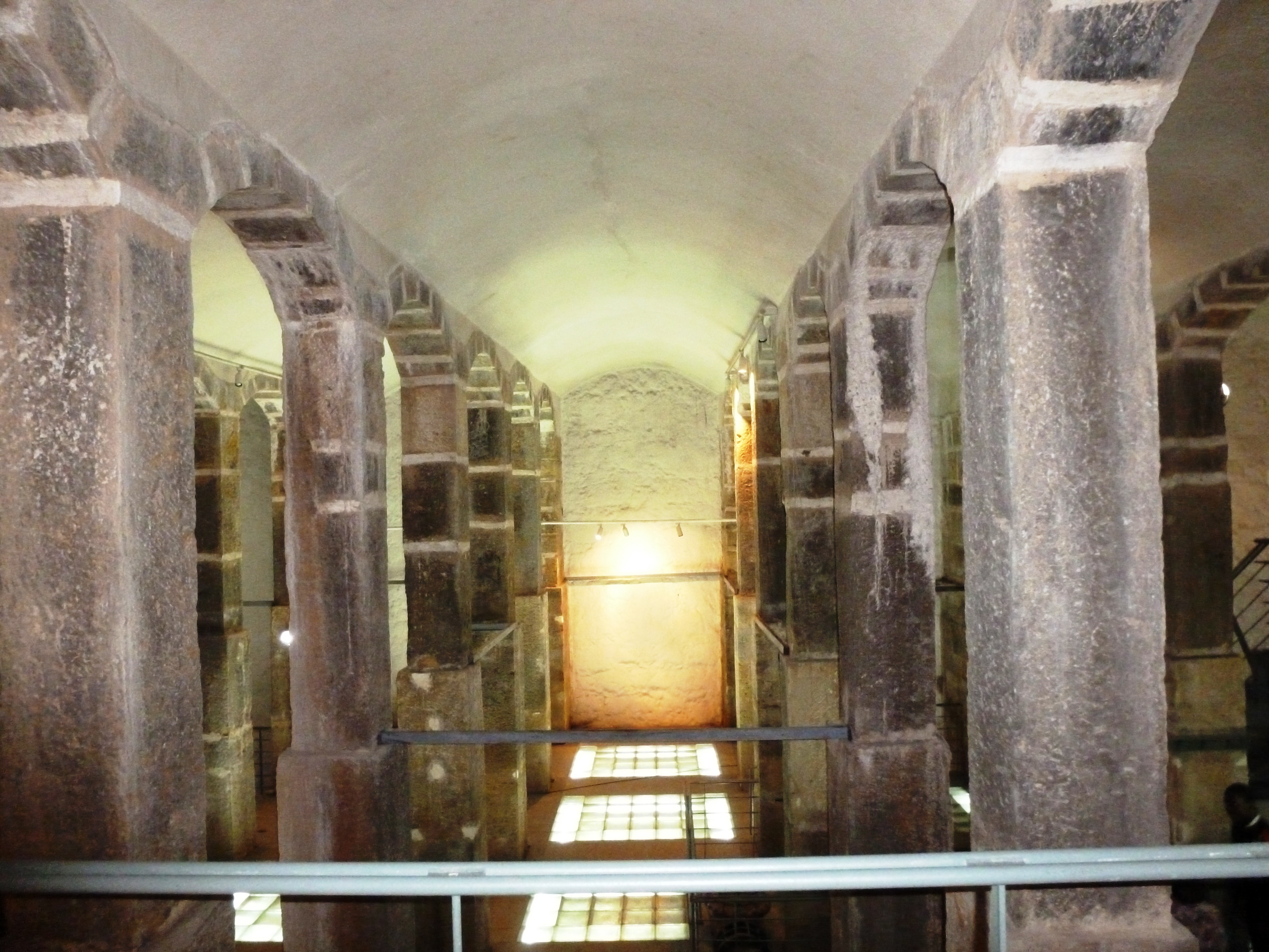 Reservatório da Patriarcal, ein unterirdischer Wasserspeicher im Zentrum der portugiesischen Hauptstadt Lissabon